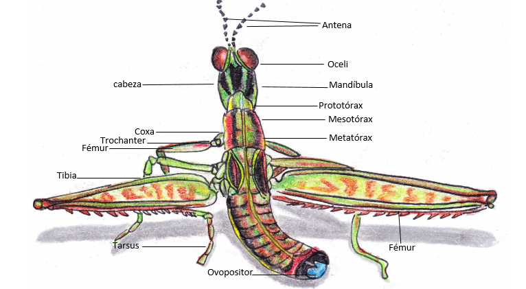 Morfología externa general de Paramastax